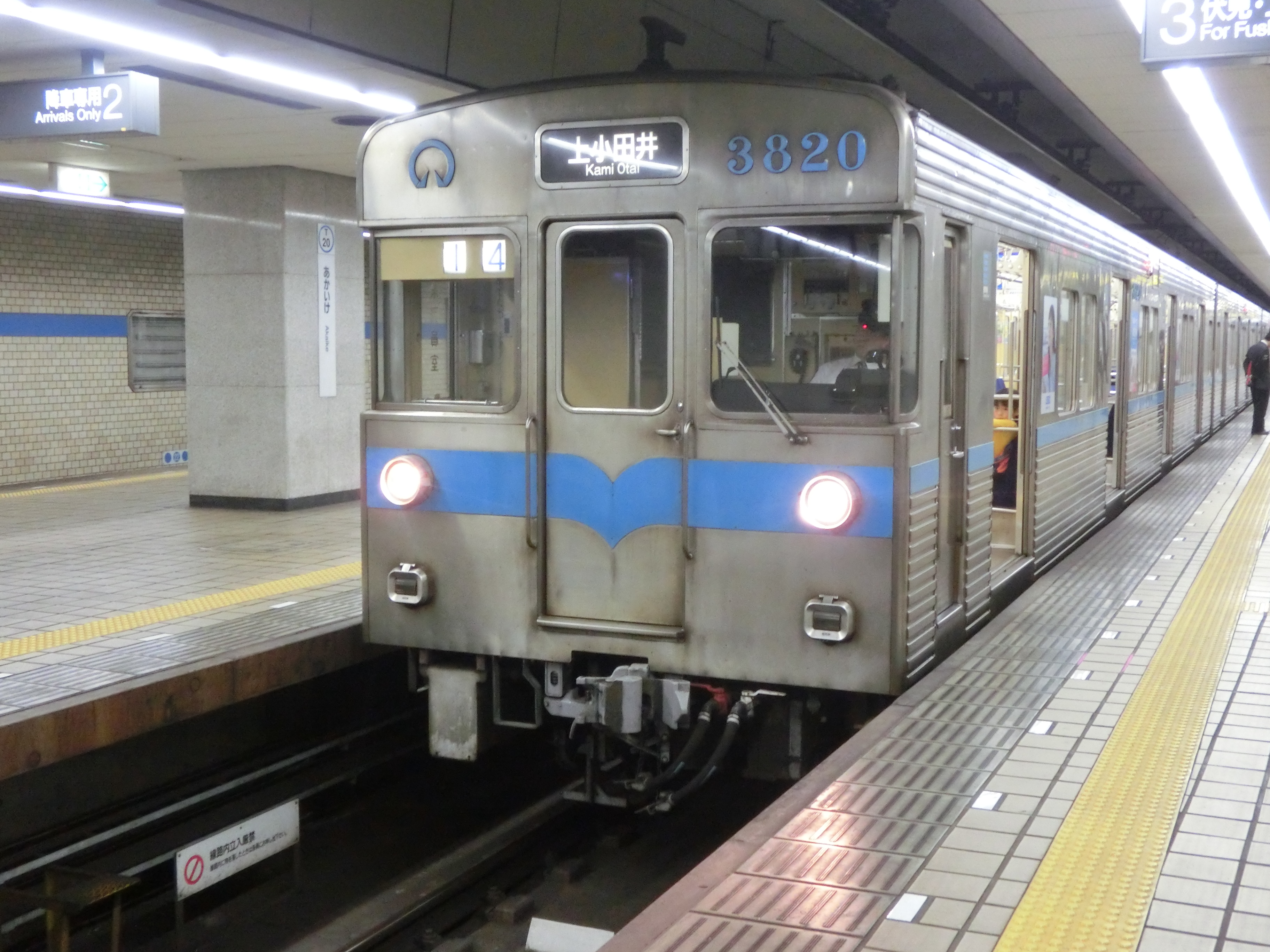 客室側窓が金属支持の開閉式に変更されている。